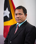 Dário Madeira, Abgeordneter des Nationalparlaments Osttimors